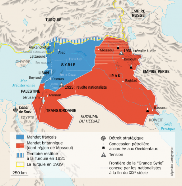 Carte du partage de l'Empire ottoman lors de la conférence de San Remo, officialisé lors du traité de Sèvres